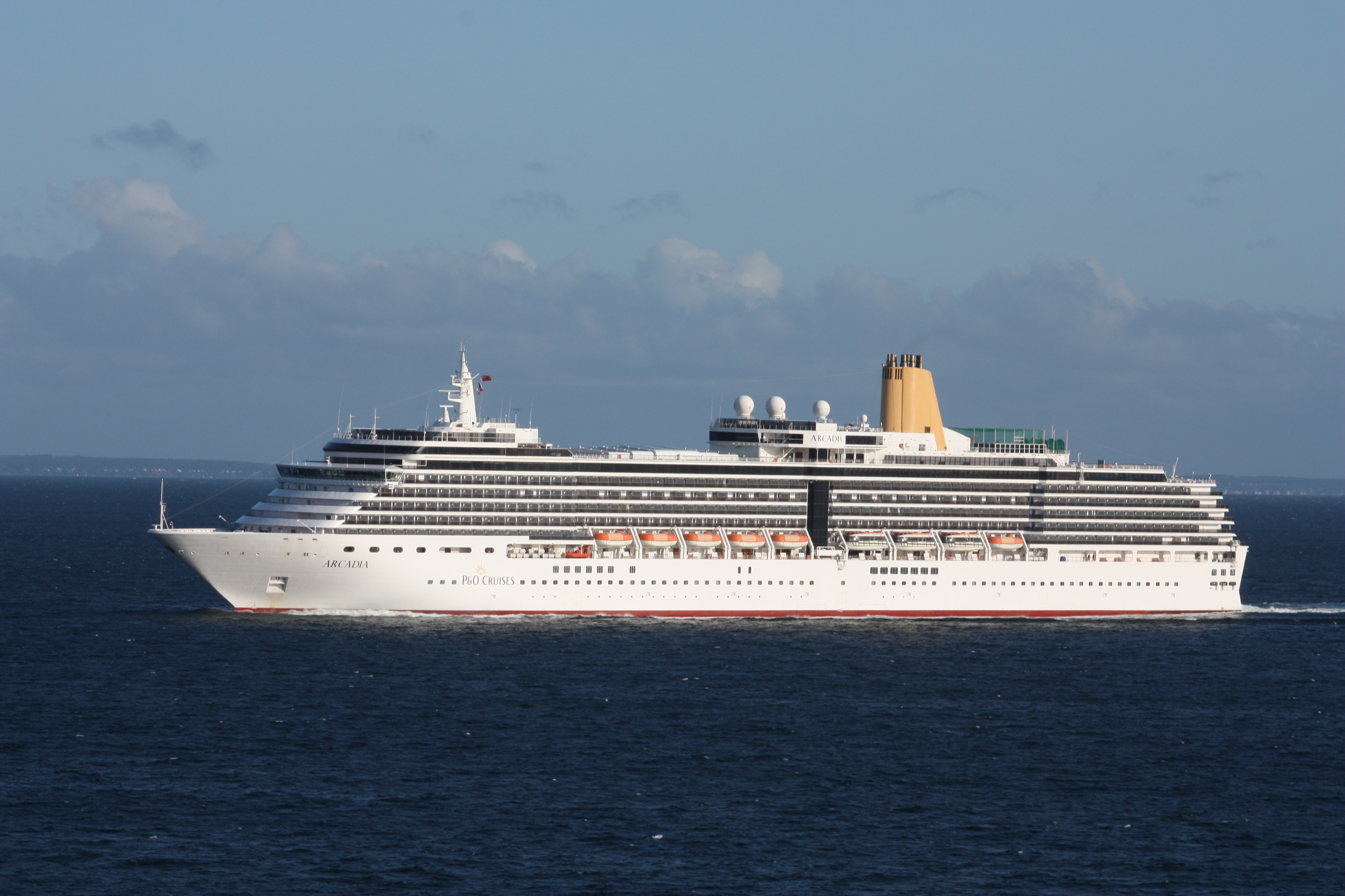 August 2009